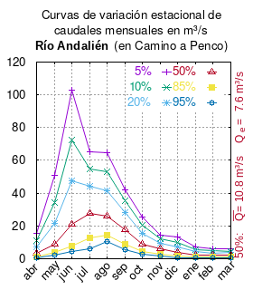 Curvas de variación estacional del río Andalién en Camino a Penco. # Dirección General de Aguas # Diagnóstico y clasificación de los cursos y cuerpos de agua según objetivos de calidad. Cuenca del río Andalién. # Santiago de Chile # Ministerio de Obras Públicas (Chile) # 2004 # url: # urlarchivo: # Tabla 4.1: Río Andalién en Camino a Penco (m3/s) , pág. 29 mes 5 10 20 50 85 95 abr 15.529 11.048 7.314 3.325 1.259 0.712 may 50.736 34.270 21.458 9.110 3.642 2.398 jun 102.968 72.531 47.446 21.082 7.763 4.317 jul 65.521 55.020 44.072 27.537 12.848 6.183 ago 64.740 52.926 41.464 26.007 14.641 10.448 sep 42.255 35.256 28.103 17.640 8.957 5.375 oct 25.199 20.231 15.433 9.007 4.330 2.621 nov 14.163 11.942 9.627 6.129 3.022 1.612 dic 13.371 10.072 7.124 3.620 1.487 0.828 ene 7.453 5.729 4.166 2.266 1.071 0.689 feb 6.199 4.832 3.570 1.992 0.957 0.614 mar 5.837 4.692 3.601 2.172 1.165 0.808 This plot was created with Gnuplot.